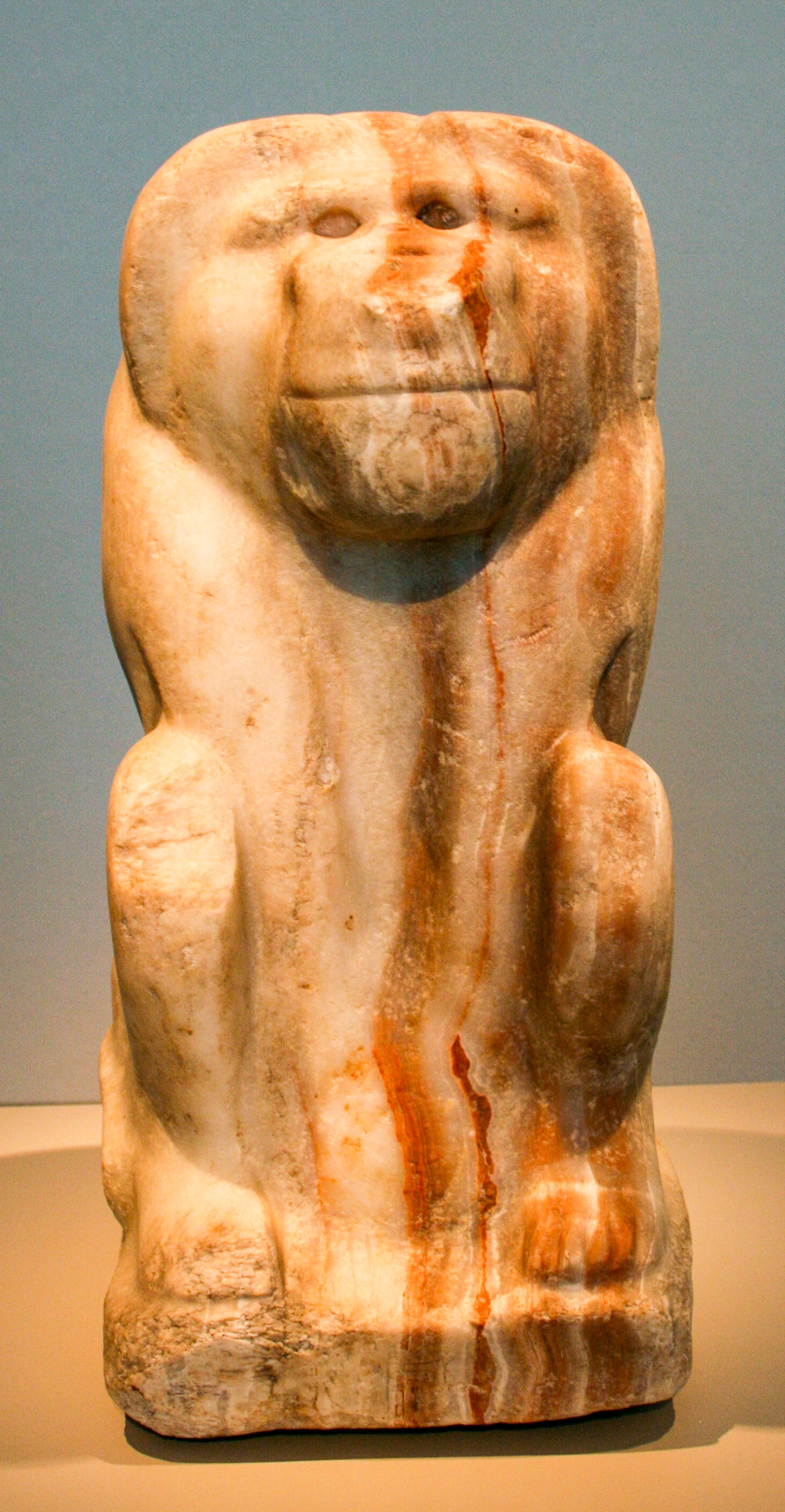 Sitzfigur eines Pavians mit der Namenskartusche des Königs Narmer - Frühzeit, um 3000 v. Chr. - Kalzit-Alabaster